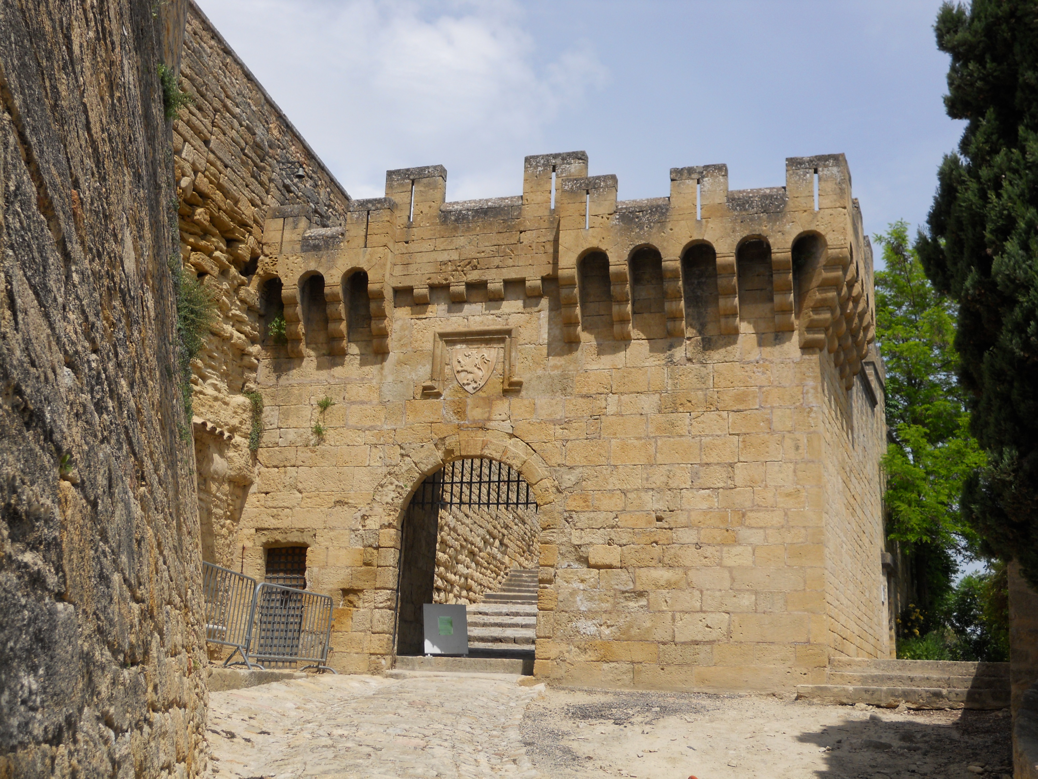 La porta del Castello